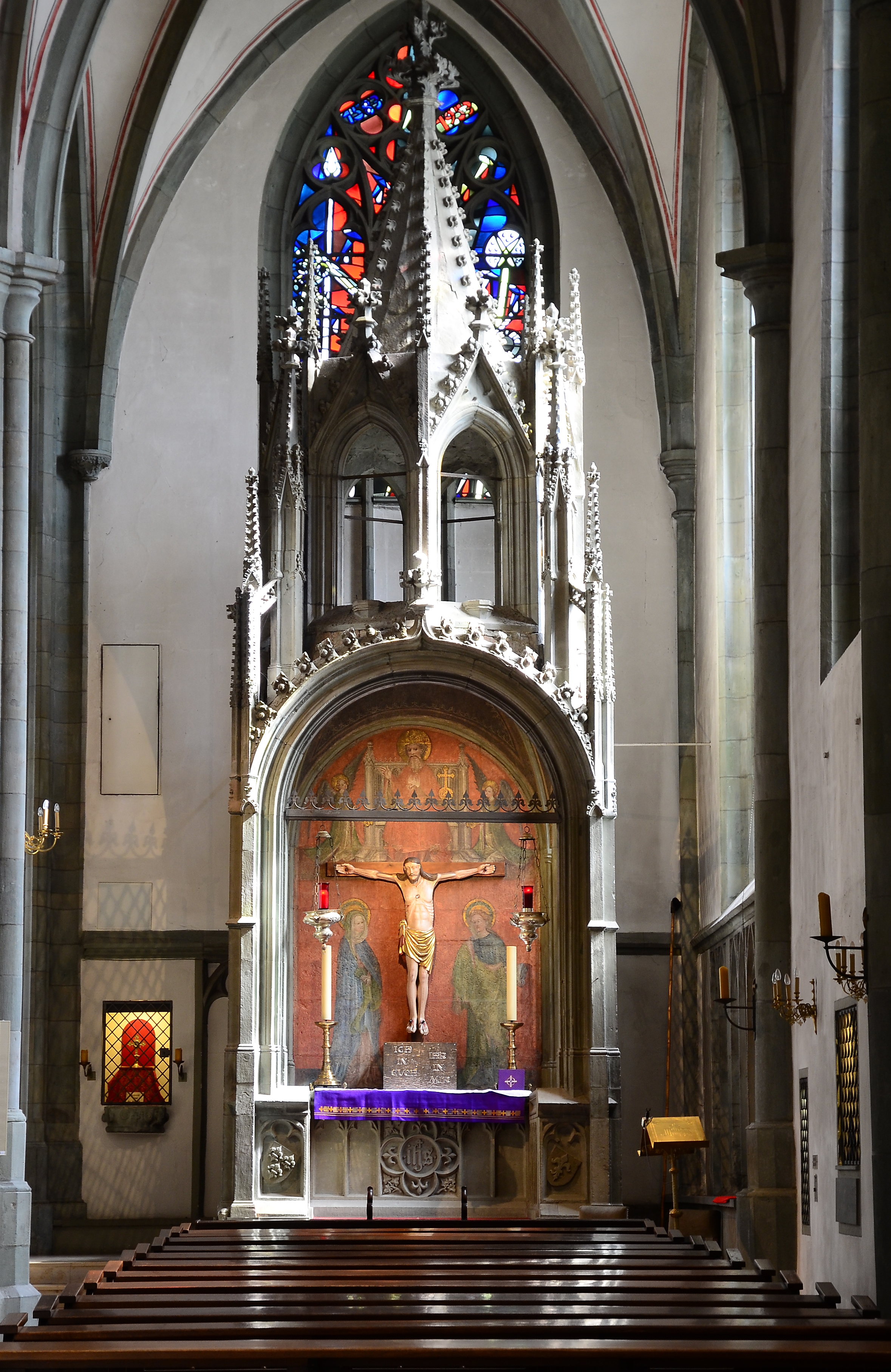 denkmalgeschützte Propsteikirche Ziborienaltar mit dem heiligen Kreuz, im Korpus befindet sich ein Reliquienbehälter